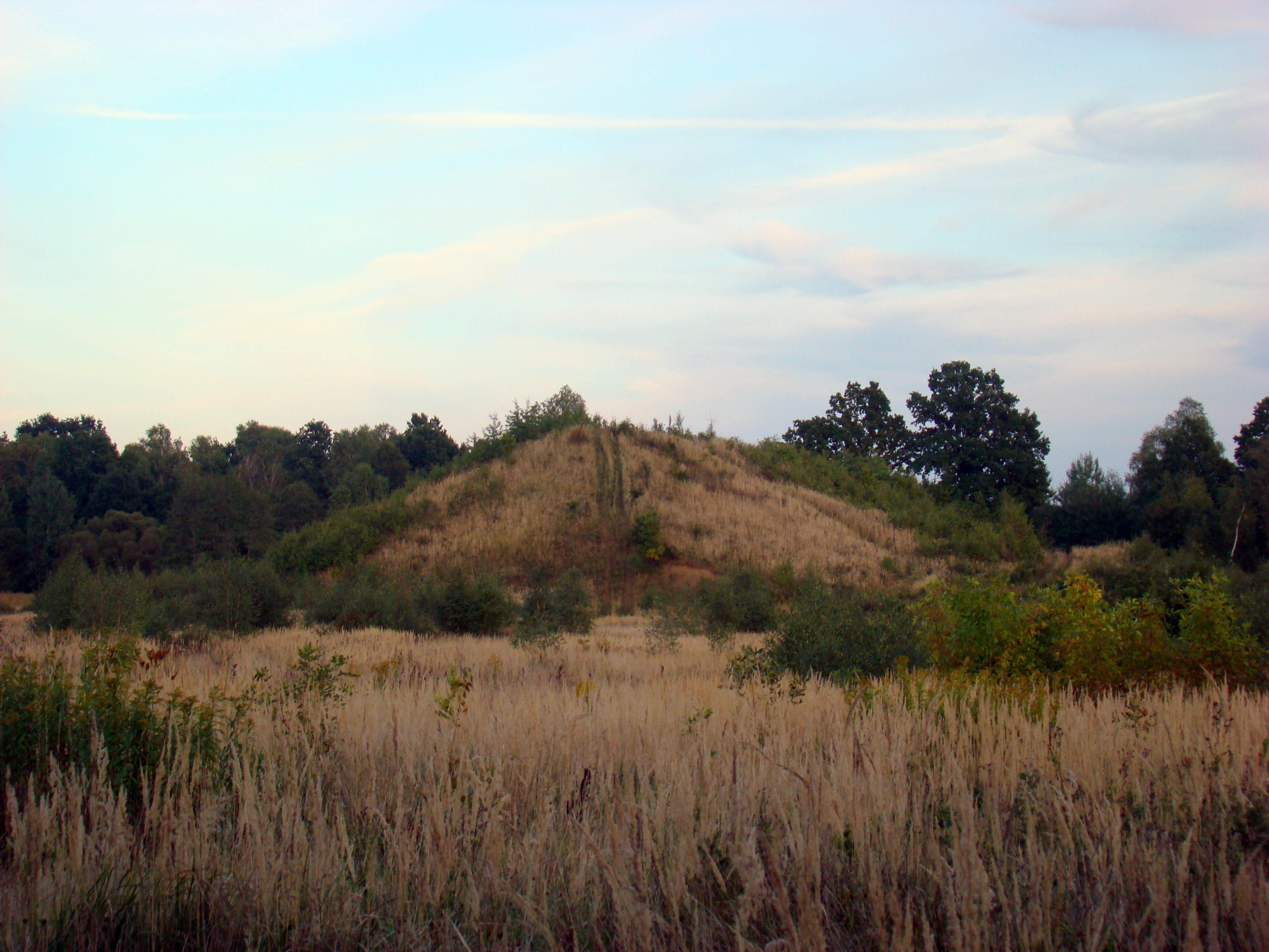 Hałda dawnej kopalni rud żelaza "Bolesław" w Dźbowie.